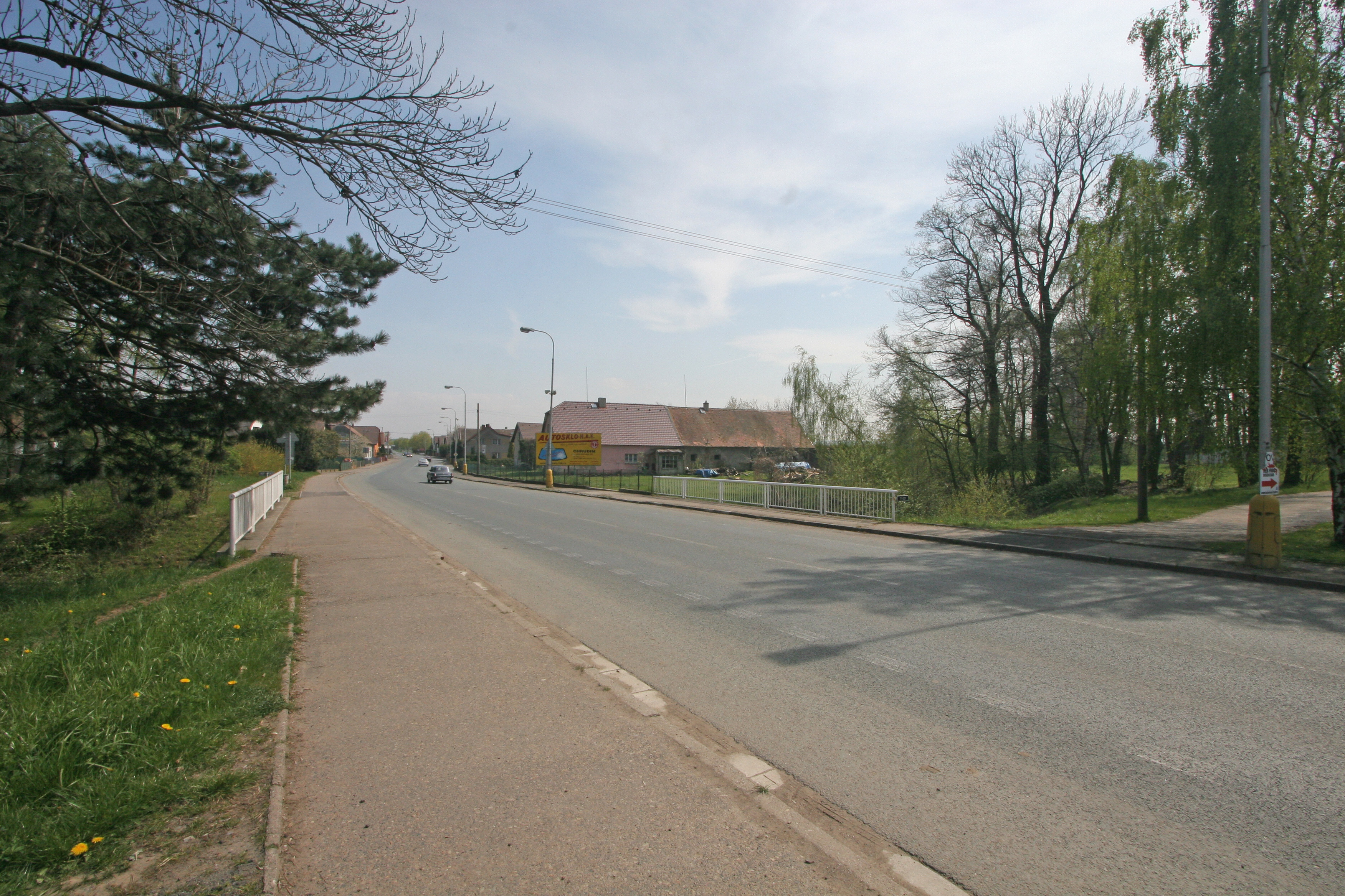 Bylany čp. 8